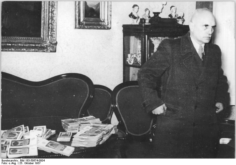 Zentralbild Repro 25.10.57 Umfangreiche Geldschiebungen aufgedeckt Großangelegte Versuche, mehrere Millionen DM der Deutschen Notenbank für Spekulationszwecke in die DDR einzuschleusen, wurden während und nach dem Geldumtausch in der DDR von der Gruppe von NATO-Politikern unternommen, die sich um Bischof Dibelius gruppiert und in führenden Organen der evangelischen Kirche Stellungen bekleiden. In Magdeburg wurde Konsisterial-Präsident Kurt Grünbaum und Oberkonsisterialrat Dr. Siegfried Klebitz wegen Verstoßes gegen das Gesetz zur Regelung des innerdeutschen Zahlungsverkehrs in Untersuchungshaft genommen. Näheres siehe ADN-Meldung Nr. 232 v. 26.10.57 UBz: Ein Teil des in der Wohnung gefundenen Geldes. Grünbaum wollte sich nicht beim Zählen des Geldes fotografieren lassen.